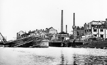 Vernielde spoorbrug en fabrieksinstallaties van de "Maastrichtsche Zinkwit Maatschappij" aan de Franciscus Romanusweg in Maastricht. Fotocollectie RHCL Maastricht, GAM 171.